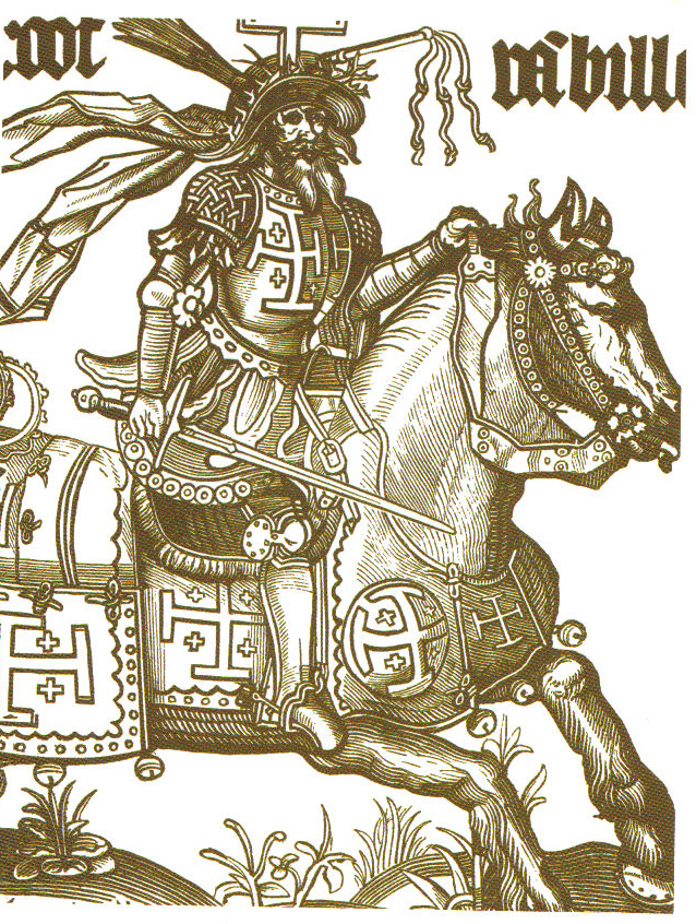 Mittelalterlicher Kupferstich aus der ANN Ronan Picture Library, abgebildet in Angus Konstam, "Europa im Mittelalter"